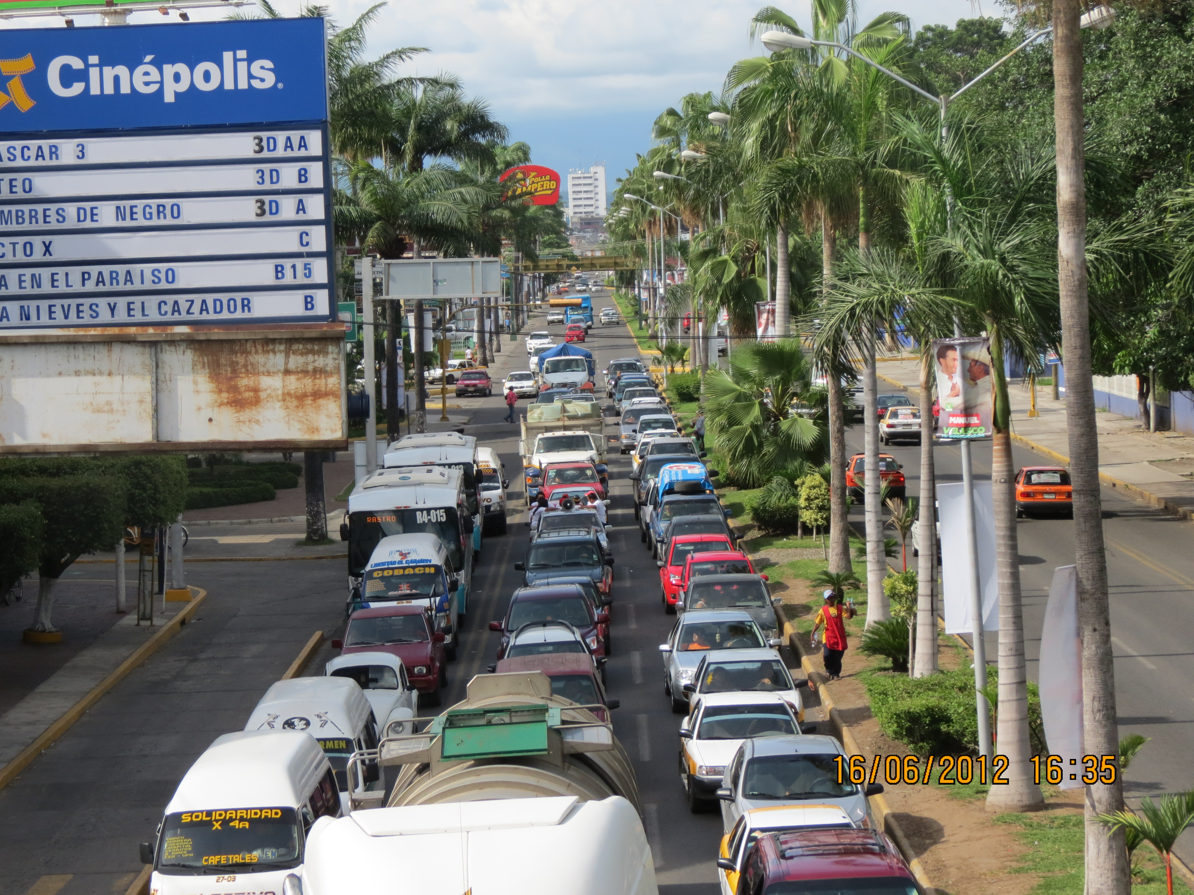 Boulevard Francisco I. Madero. Una de las vialidades más importantes de la Ciudad de Tapachula.